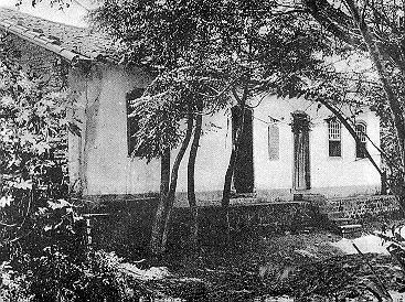 Vue ancienne de la Feitoria do Rio dos Sinos.